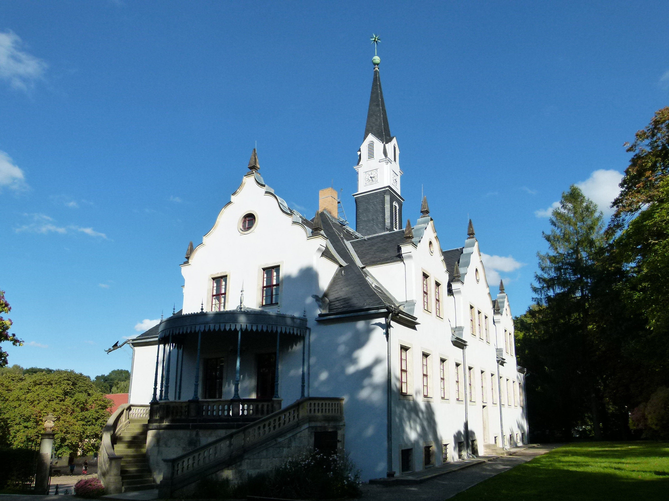 Schloss Burgk, Freital